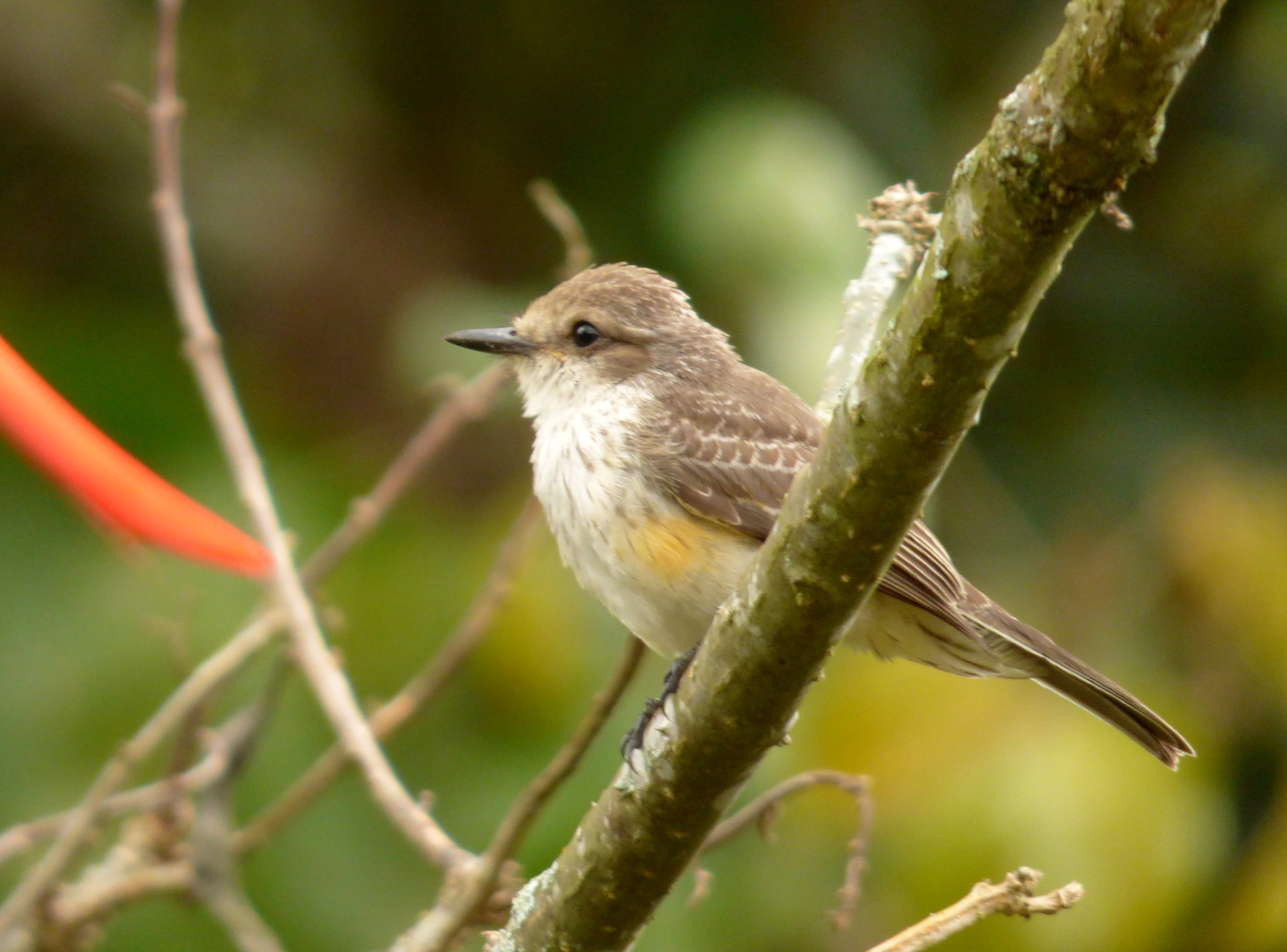 Pyrocephalus obscurus (hembra), Colombia